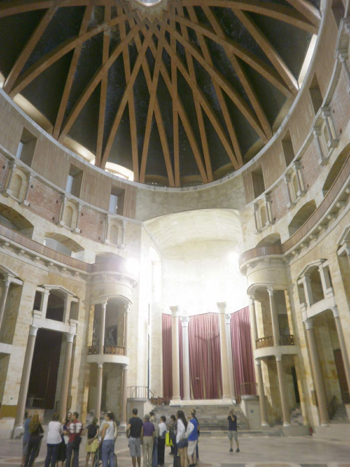 Iglesia de la Laboral Ciudad de la Cultura (ex Universidad Laboral de Gijón)